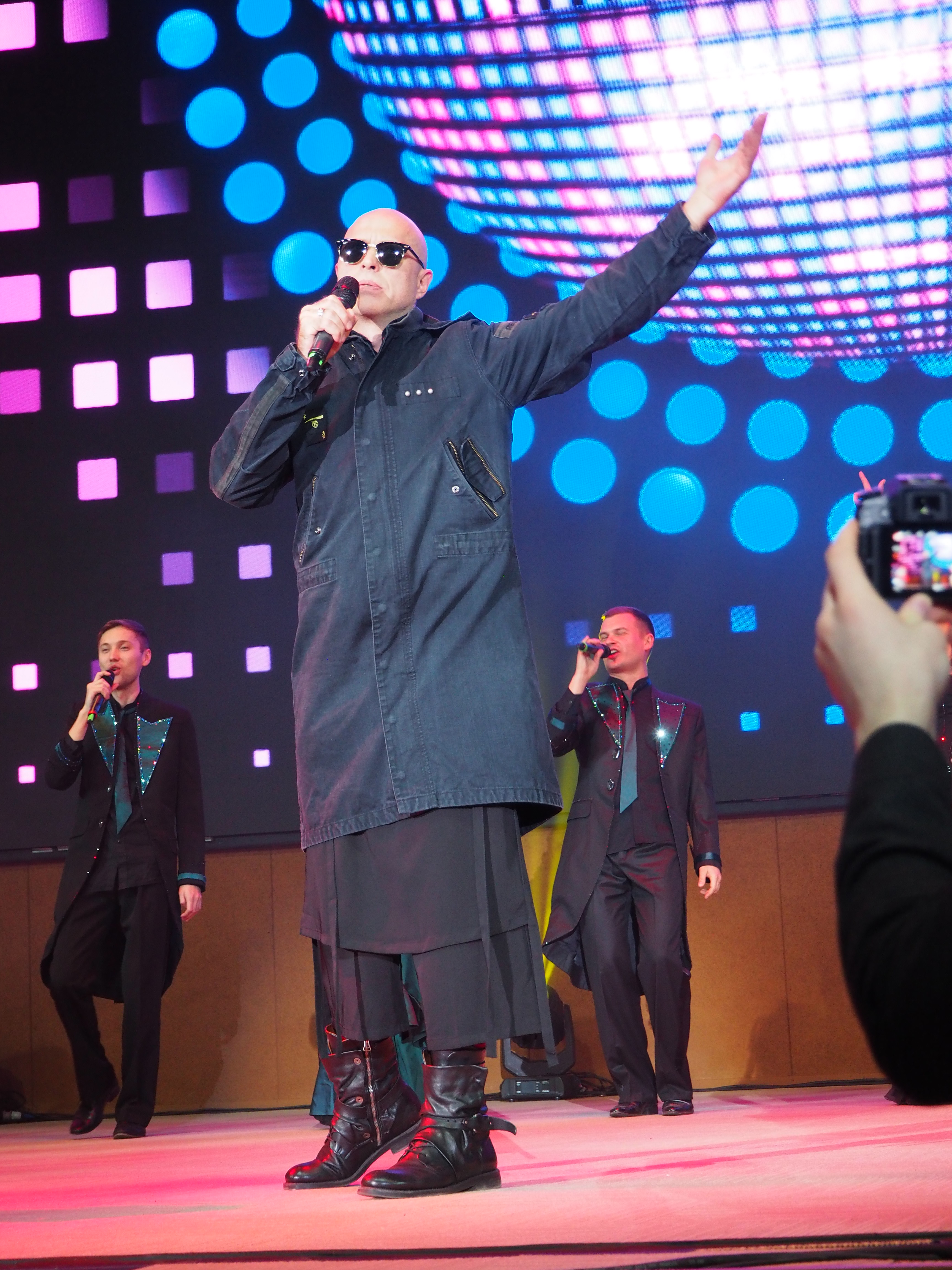 Церемония вручения Премии Рунета 2017